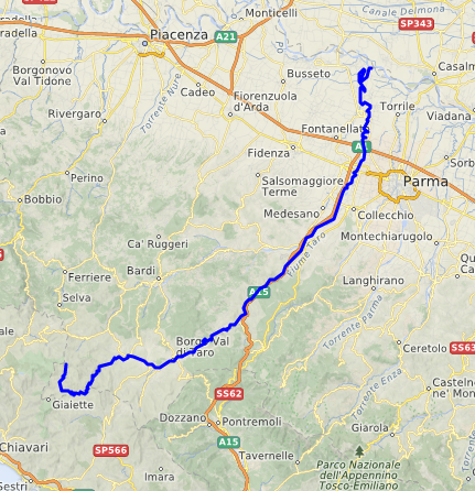 carte réalisée sur umap This map may be incomplete, and may contain errors. Don't rely solely on it for navigation.